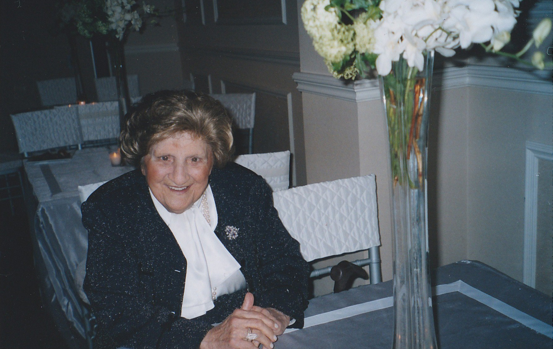 Gutta Sternbuch.